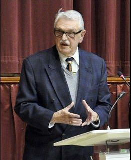 Professor Dr. Gottfried Scholz, Musikwissenschaftler